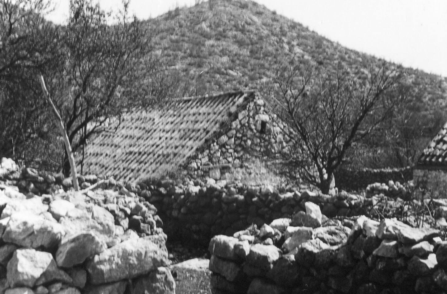 Шибуљина, старе куће у заселку Асановац.